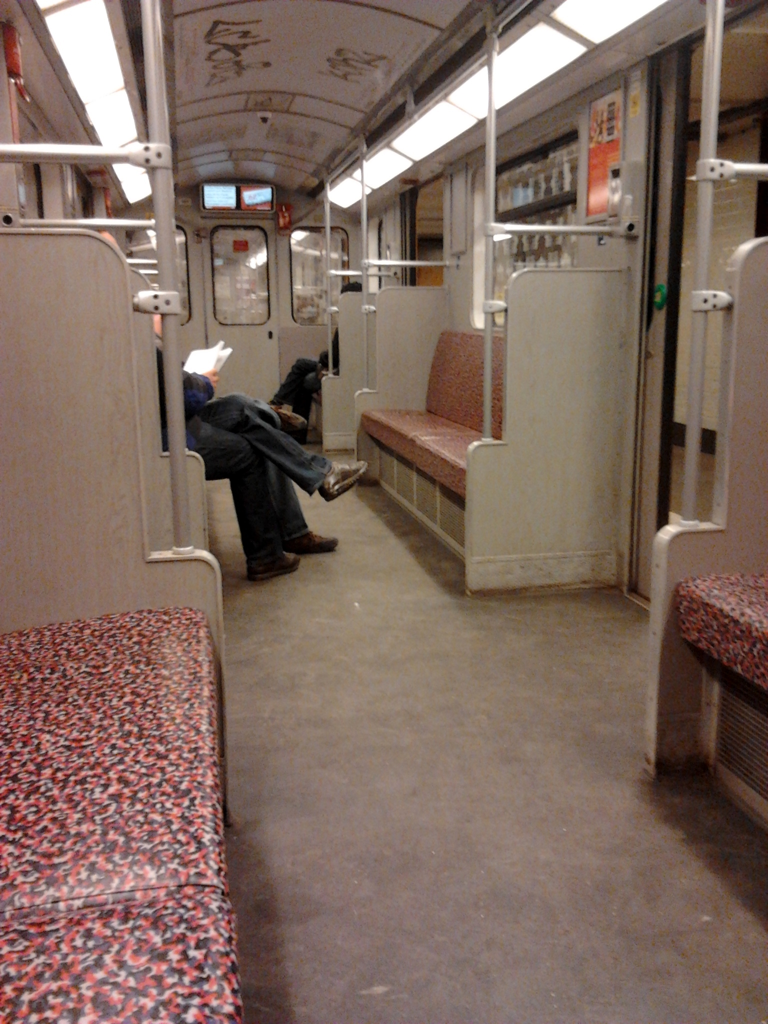 Kleinprofilwagen der Berliner U-Bahn von innen. Hier auf der U4.